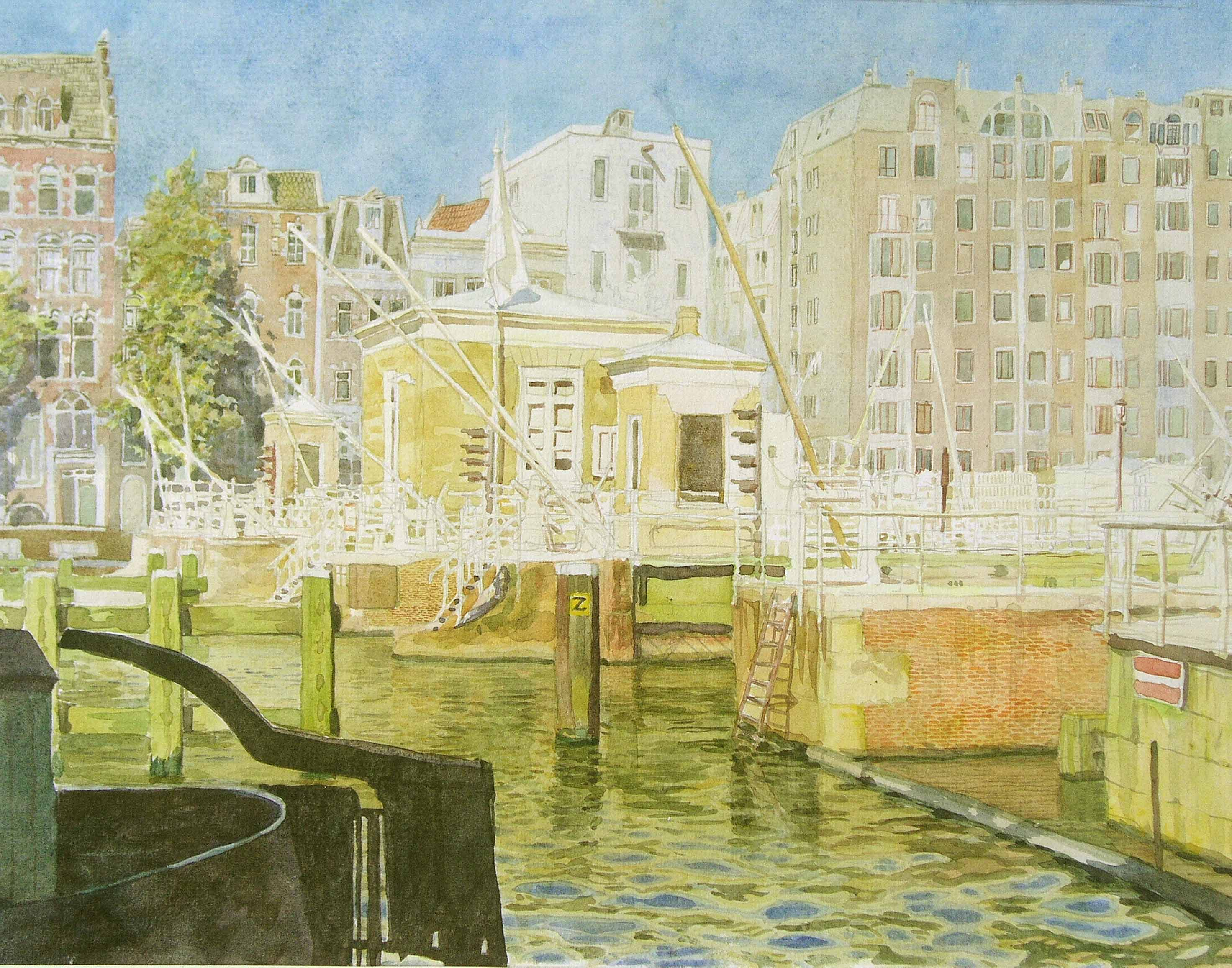 Амстердам (центр города)